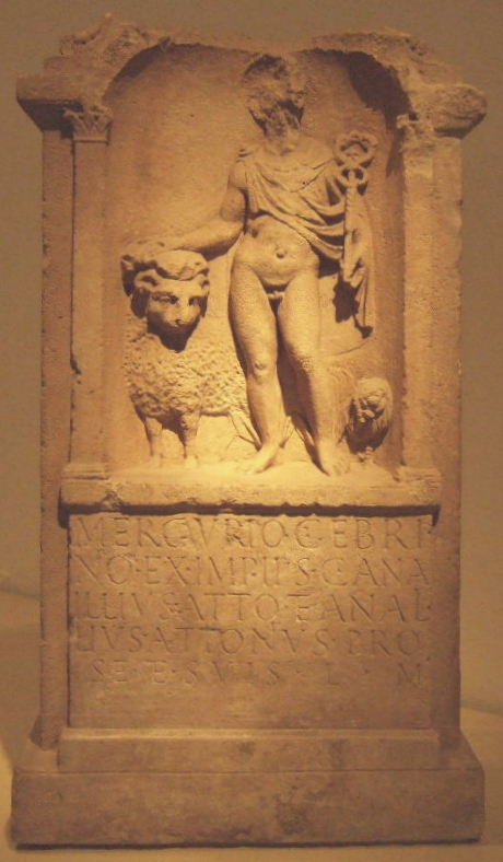 Altar für Mercurius Gebrinius – 2. Hälfte des 2. Jahrhunderts n. Chr. Kalkstein Fundort: Bonn - Münster heutiger Standort: Rheinisches Landesmuseum Bonn